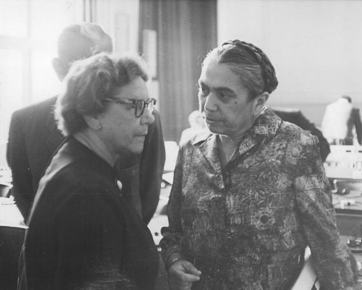 Oberstes Gericht, Globke-Prozess, Hilde Benjamin, Friedel Malter Zentralbild Stöhr-9.7.1963 2. Tag im Globke-Prozeß eröffnet. Der 1. Strafsenat des Obersten Gerichts der DDR setzte am Vormittag des 9. Juli 1963 die Verhandlungen gegen den des millionenfachen Mordes Angeklagten Staatssekretär des Bonner Bundeskanzleramtes, Dr. Globke, fort. UBz: Hilde Benjamin, Minister der Justiz der DDR, (rechts) im Gespräch mit Friedel Malter, Vorsitzende des Komitees zum Schutze der Menschenrechte vor Beginn des 2. Prozeßtages.